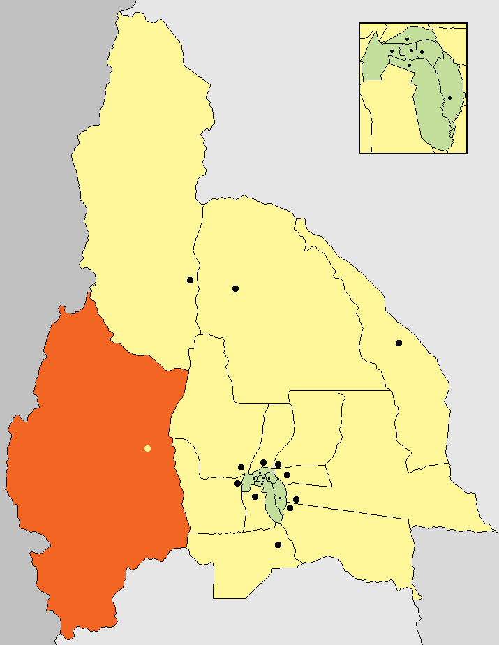 Dto.Calingasta, donde se encuentra El Barreal Blanco